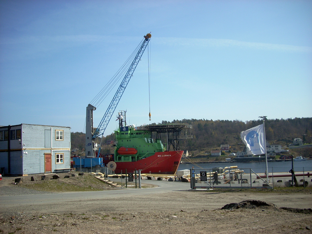 Arendal regionhavn på Eydehavn, Arendal